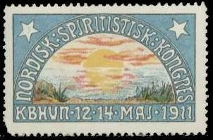 Timbre du Danemark pour commémorer un congrès spirite en 1911